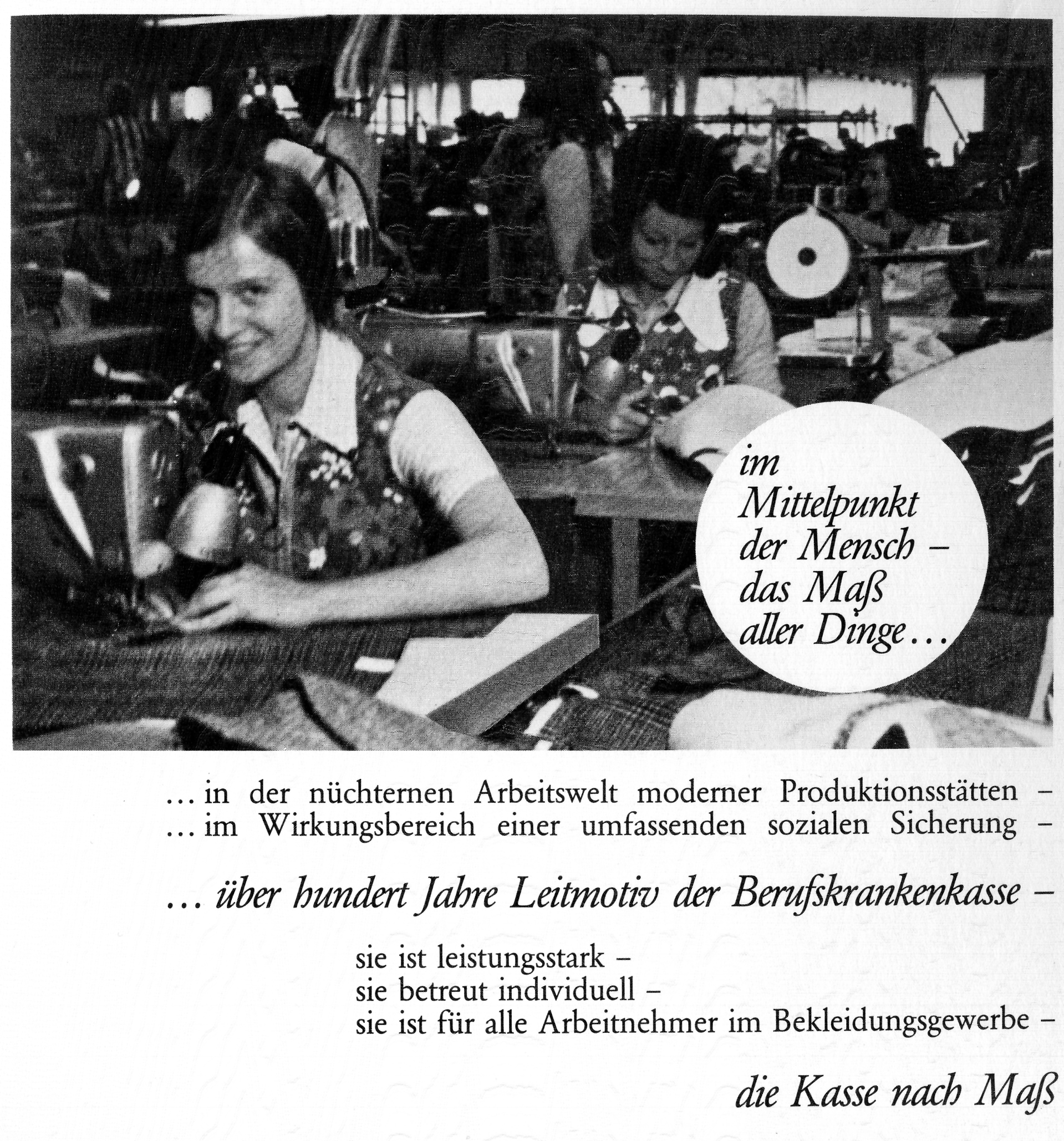 BK-Selbstdarstellung